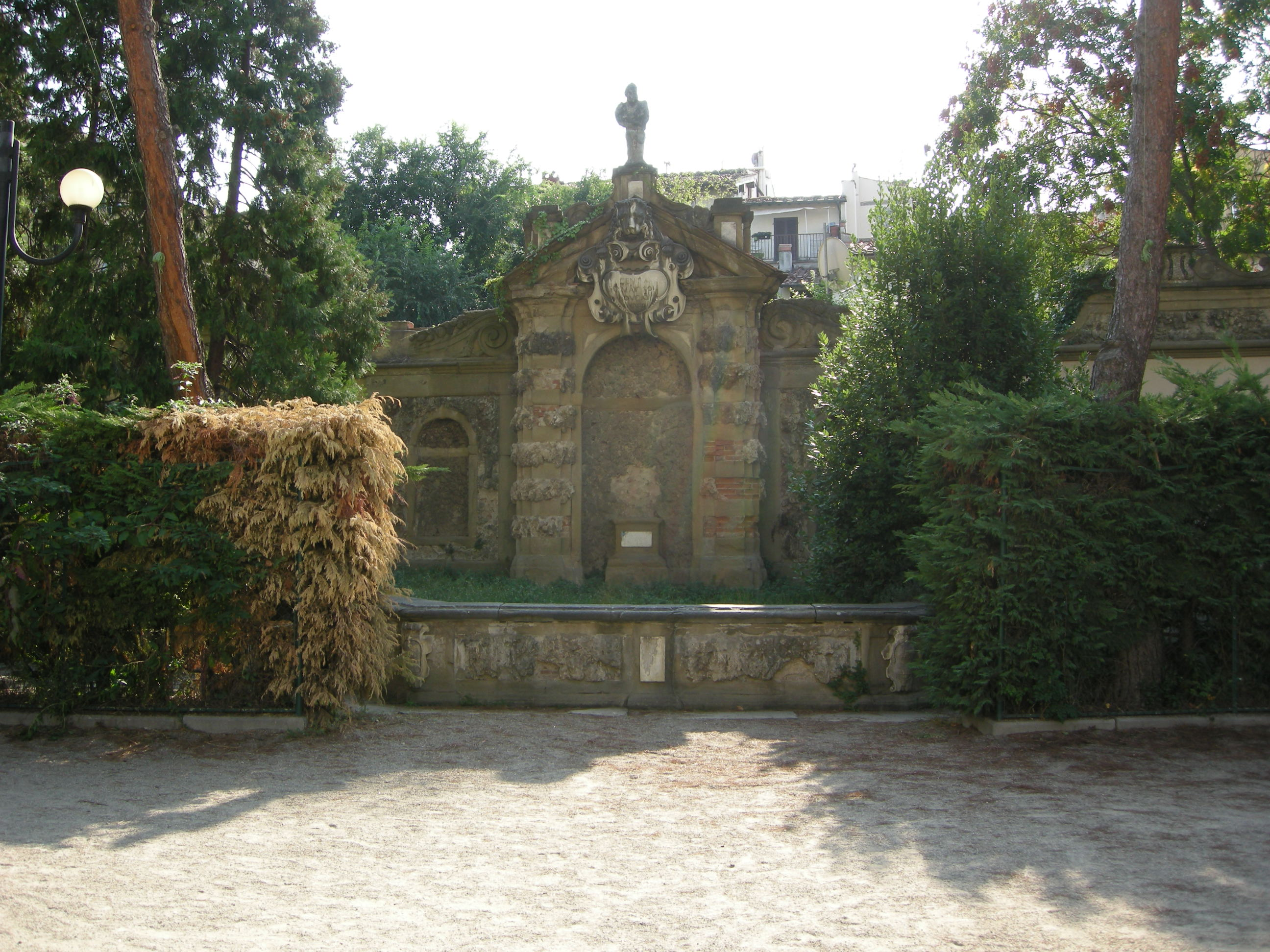 Palazzo ricasoli salviati, giardino, fontana